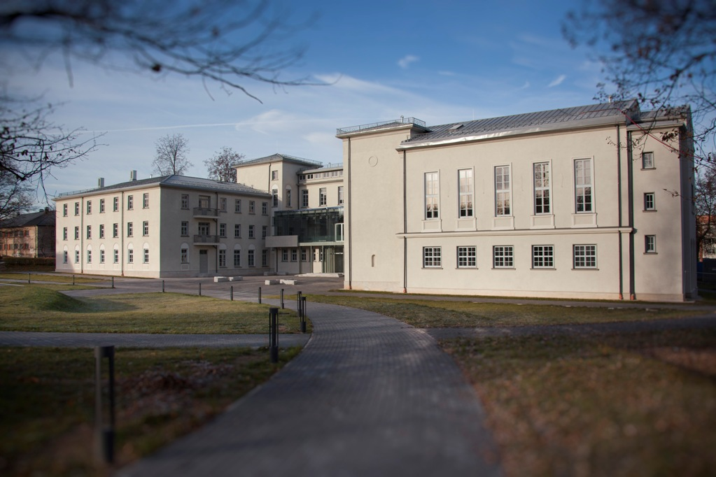 Rēzeknes Tehnoloģiju akadēmija Atbrīvošanas alejā 115